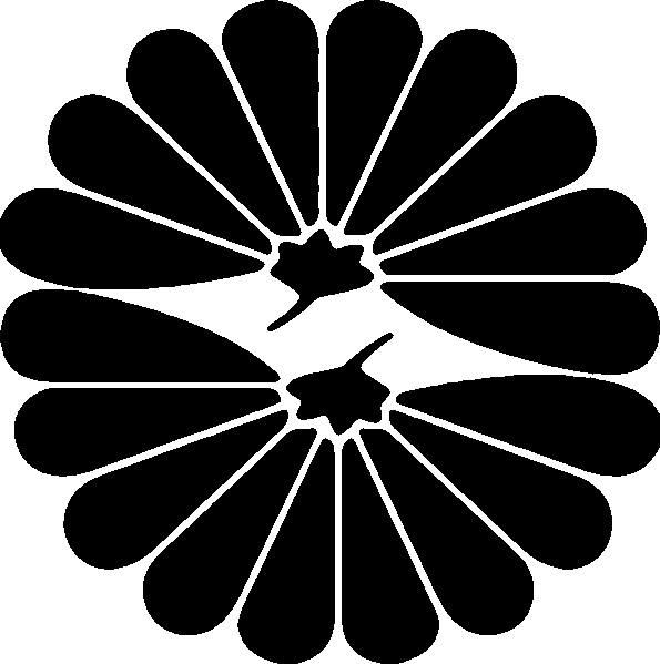 中文（台灣）: 台南神社位於北白川宮能久親王臨終之地，台灣總督府設為御遺跡所，因此採用北白川宮的家紋，兩朵側面看的菊花